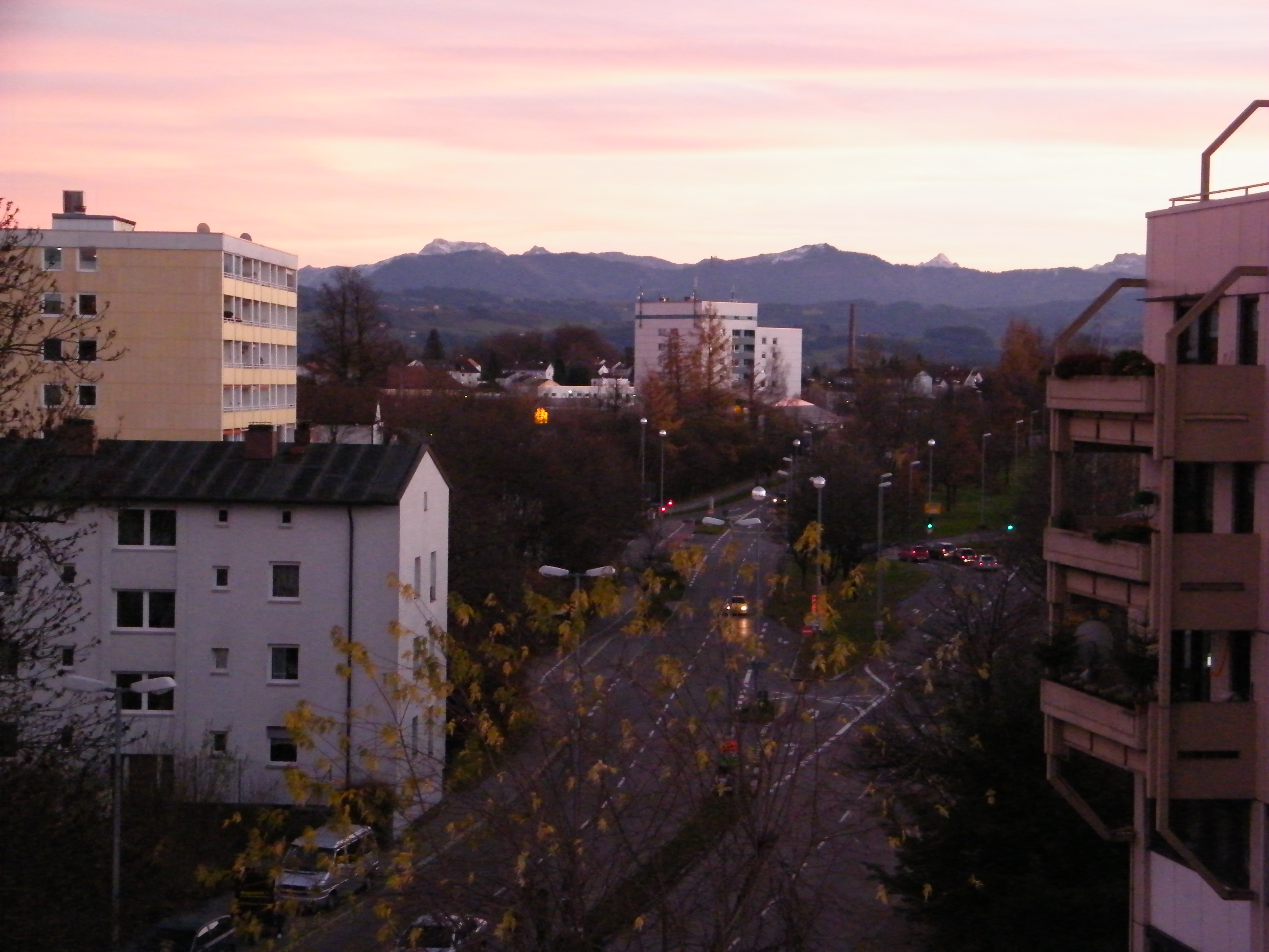 Allgäu, Winter 2010 Ausblick auf die Alpen von Kempten